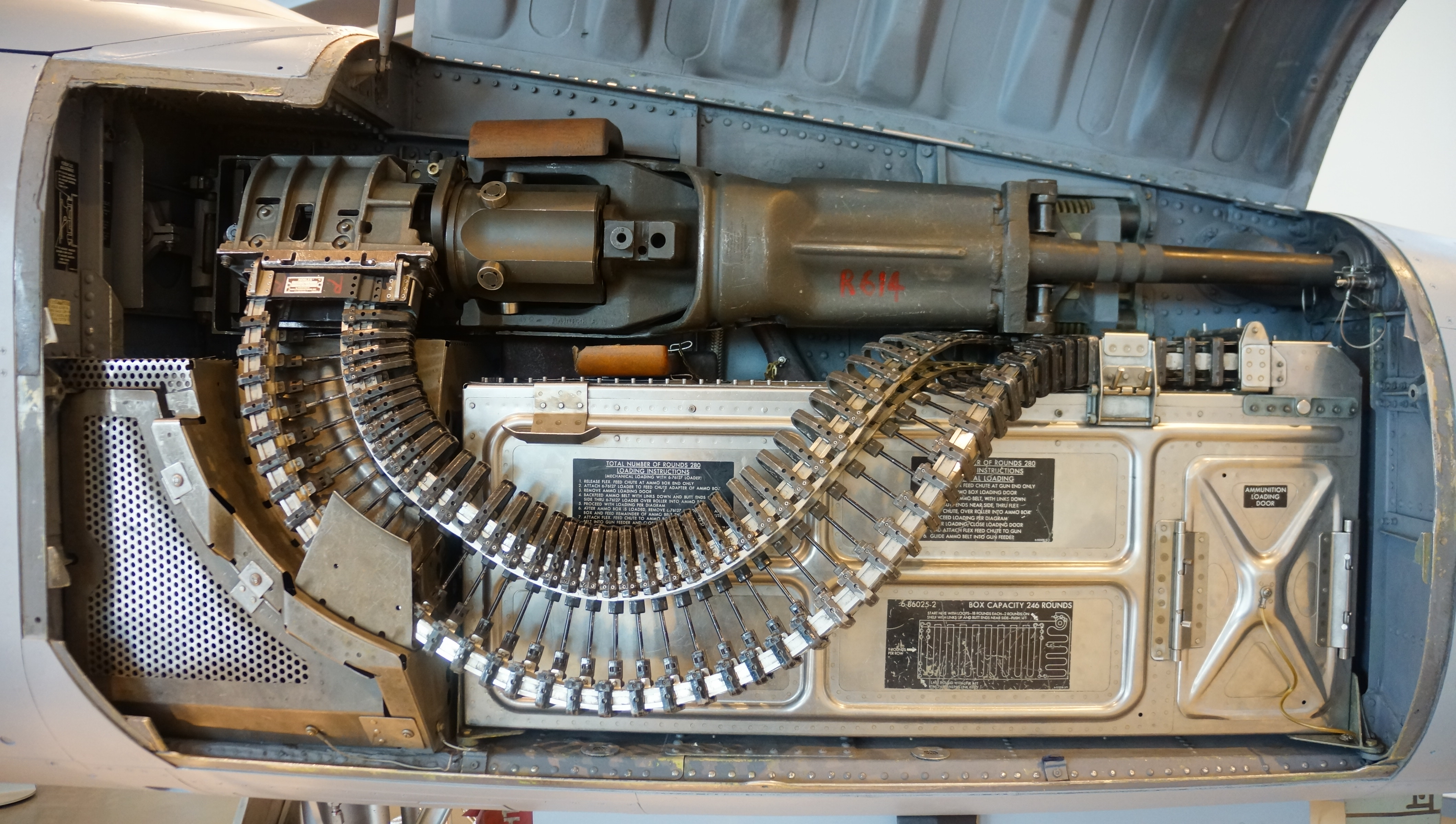 大韓民国空軍 F-5E戦闘機（カットモデル） M39A2 20mm機関砲。 2014年6月6日 済州航空宇宙博物館内にて。